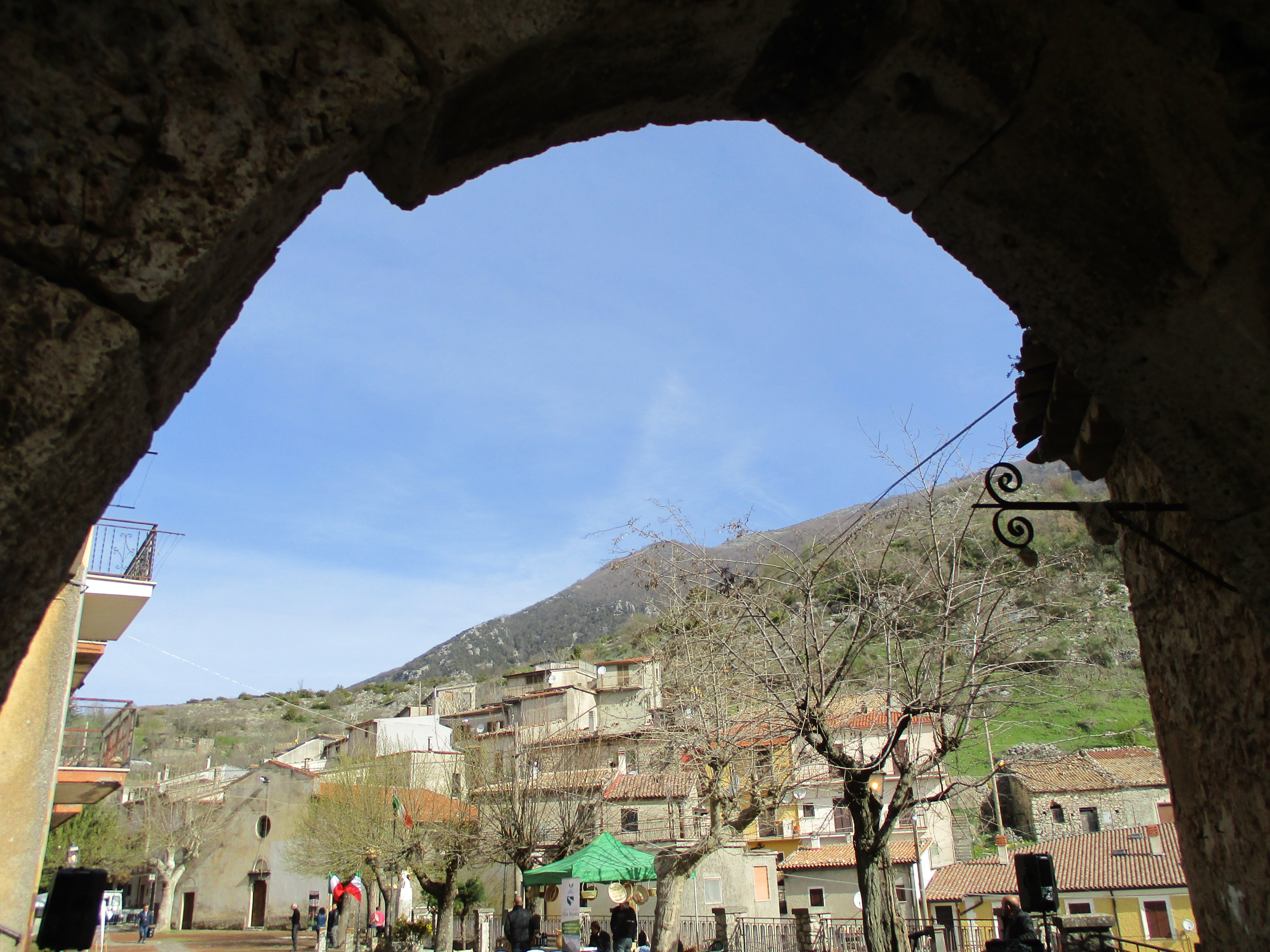 Morrea vista dall'arco di San Michele